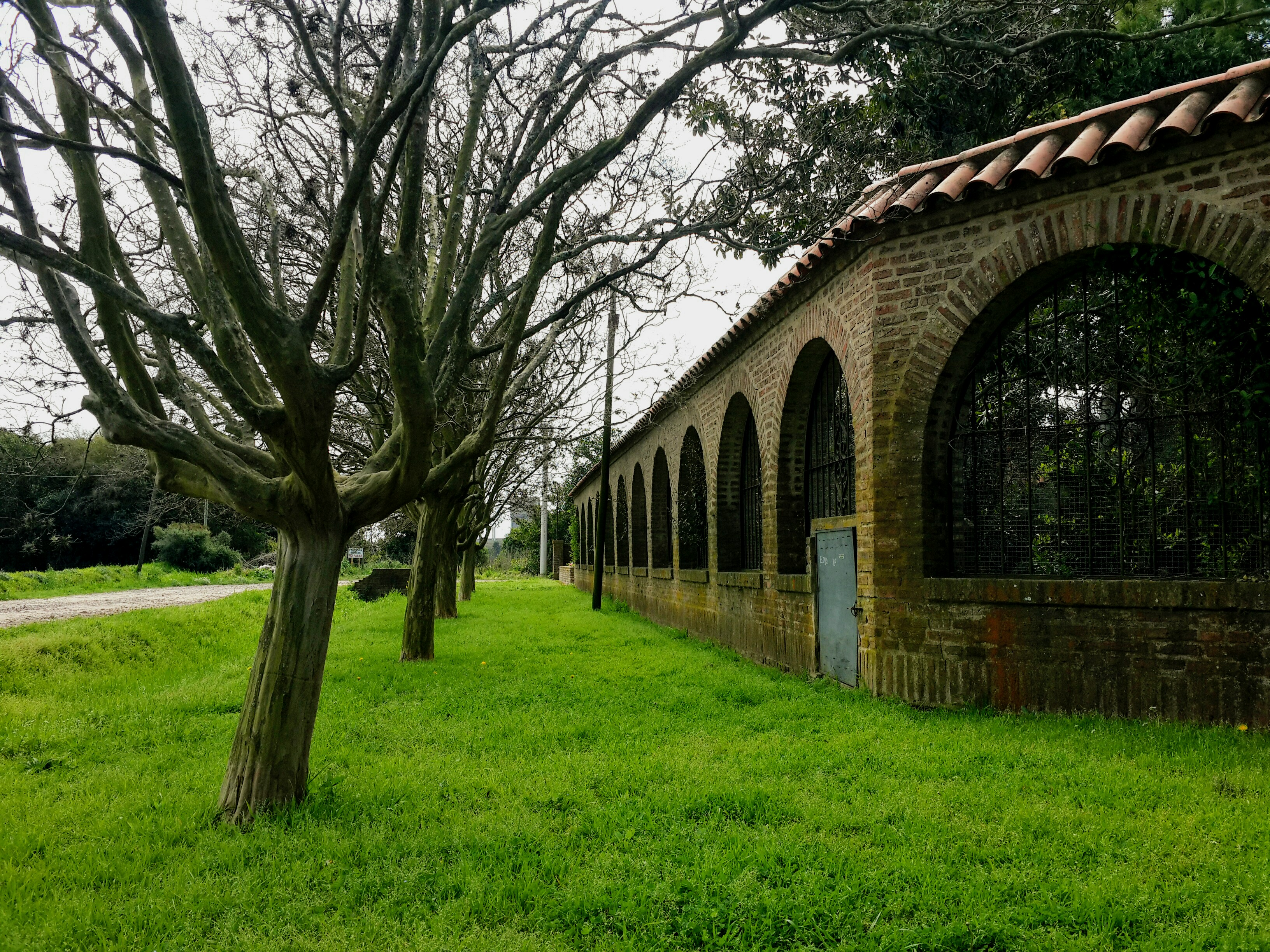 Entrada al convento o monasterio de las mojas misioneras de las carmelitas en el pueblo de Esther, Argentina.